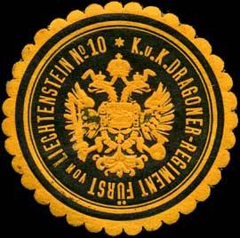 Sealing stamp Title: K.u.K. Dragoner-Regiment Fürst von Liechtenstein No. 10 Description: gelb, schwarz, geprägt Place: size: 4 cm